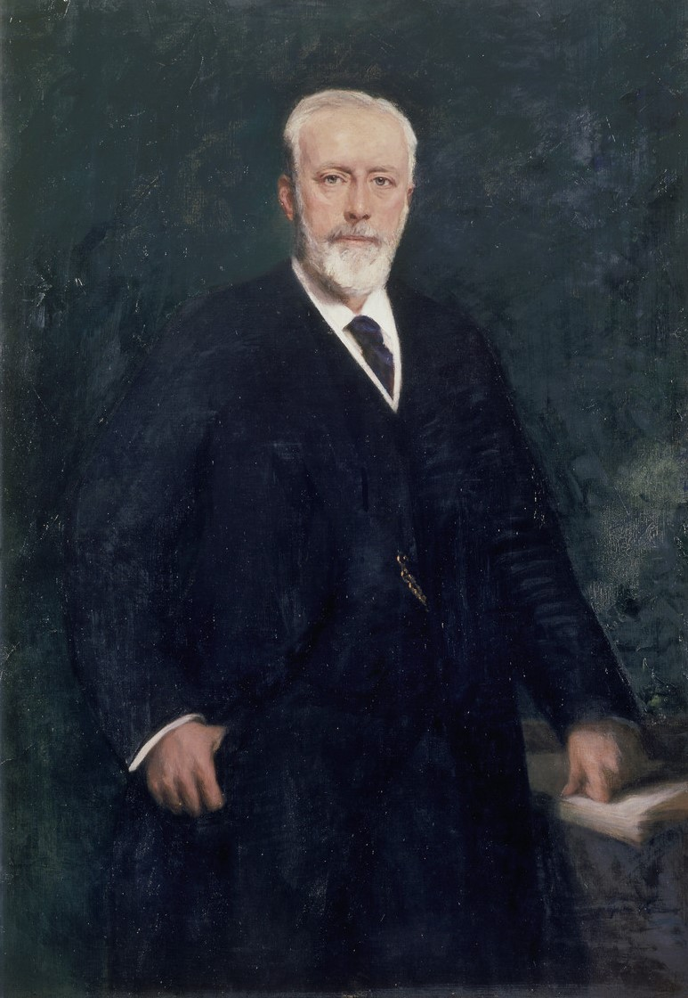 Sophie Koner: Bildnis Gustav Michels, c. 1900. Kölnisches Stadtmuseum (KSM 1964/118, Köln)